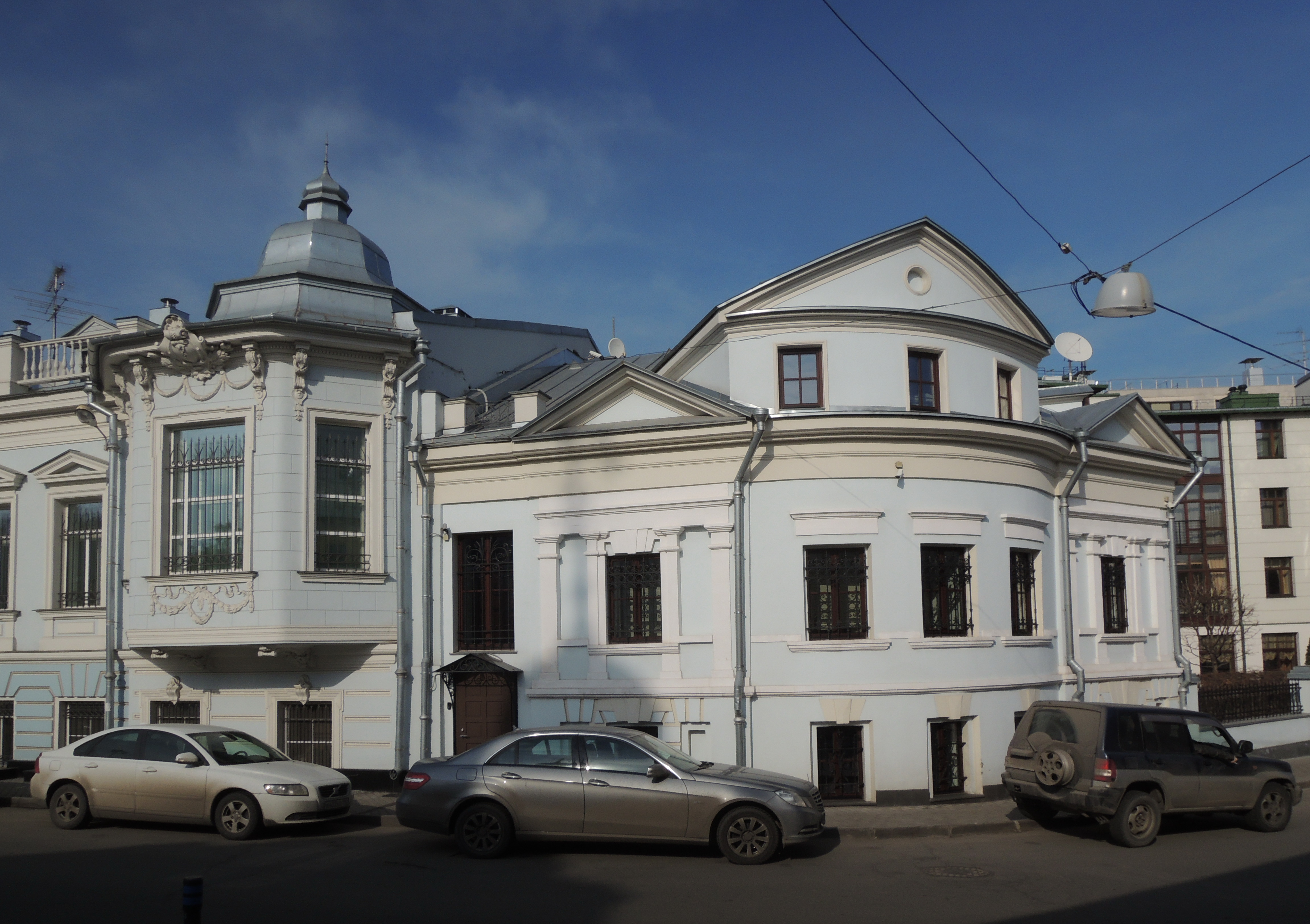 Городская усадьба Бухвостовых (Москва) 2-й Зачатьевский пер., 5/23 строение 1 Усадьба Бухвовстовых – малоизвестная жемчужина московской архитектуры конца XVIII века. Д. И. Бухвостов приобрёл усадьбу в конце ХVIII века и владел ею около 40 лет. Построенные при Бухвостове здания, в основном, сохранили свою объемно-планировочную структуру до наших дней.